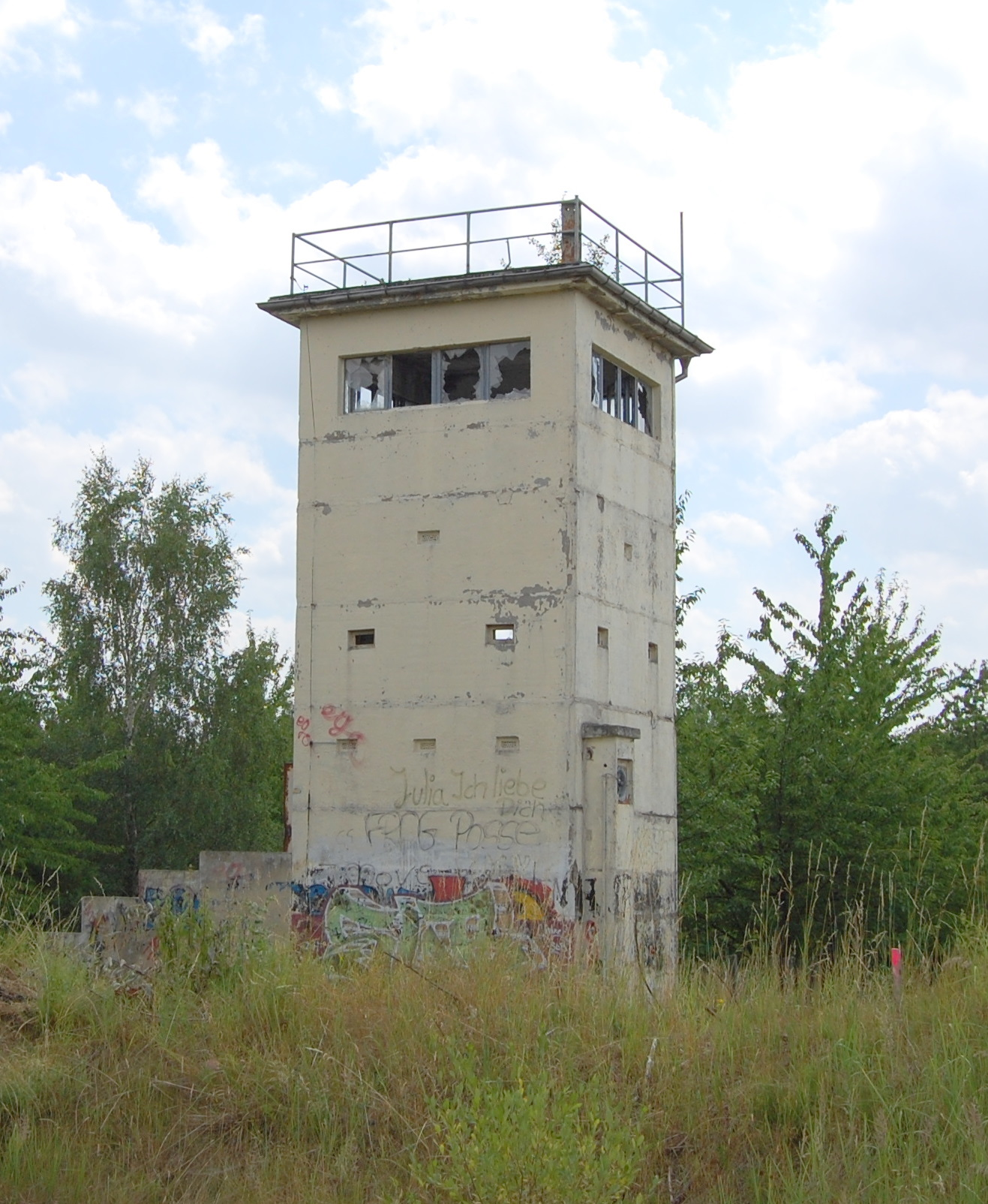 Wachturm an der ehemaligen innerdeutschen Grenze bei Morsleben